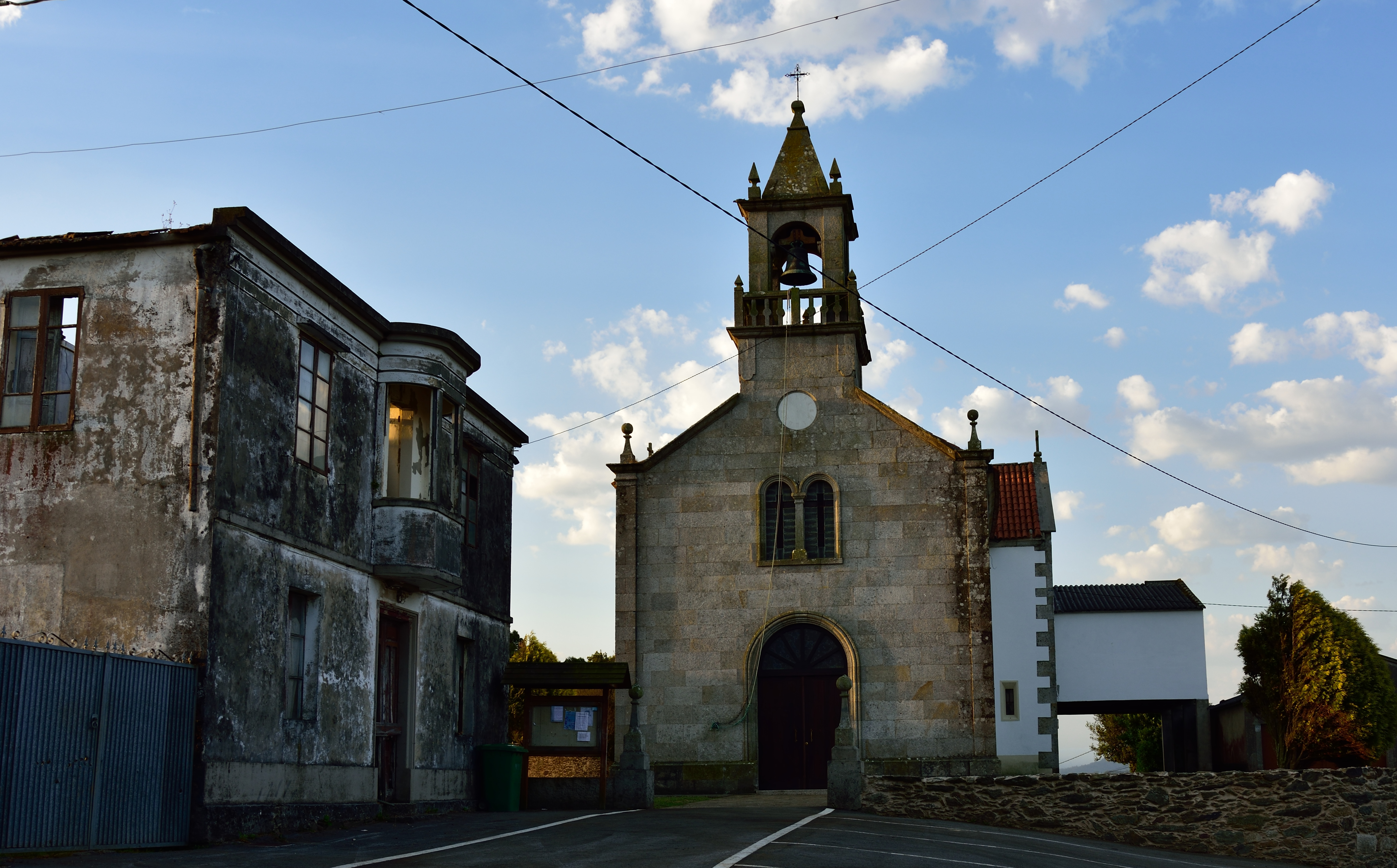 Igrexa de Pazos